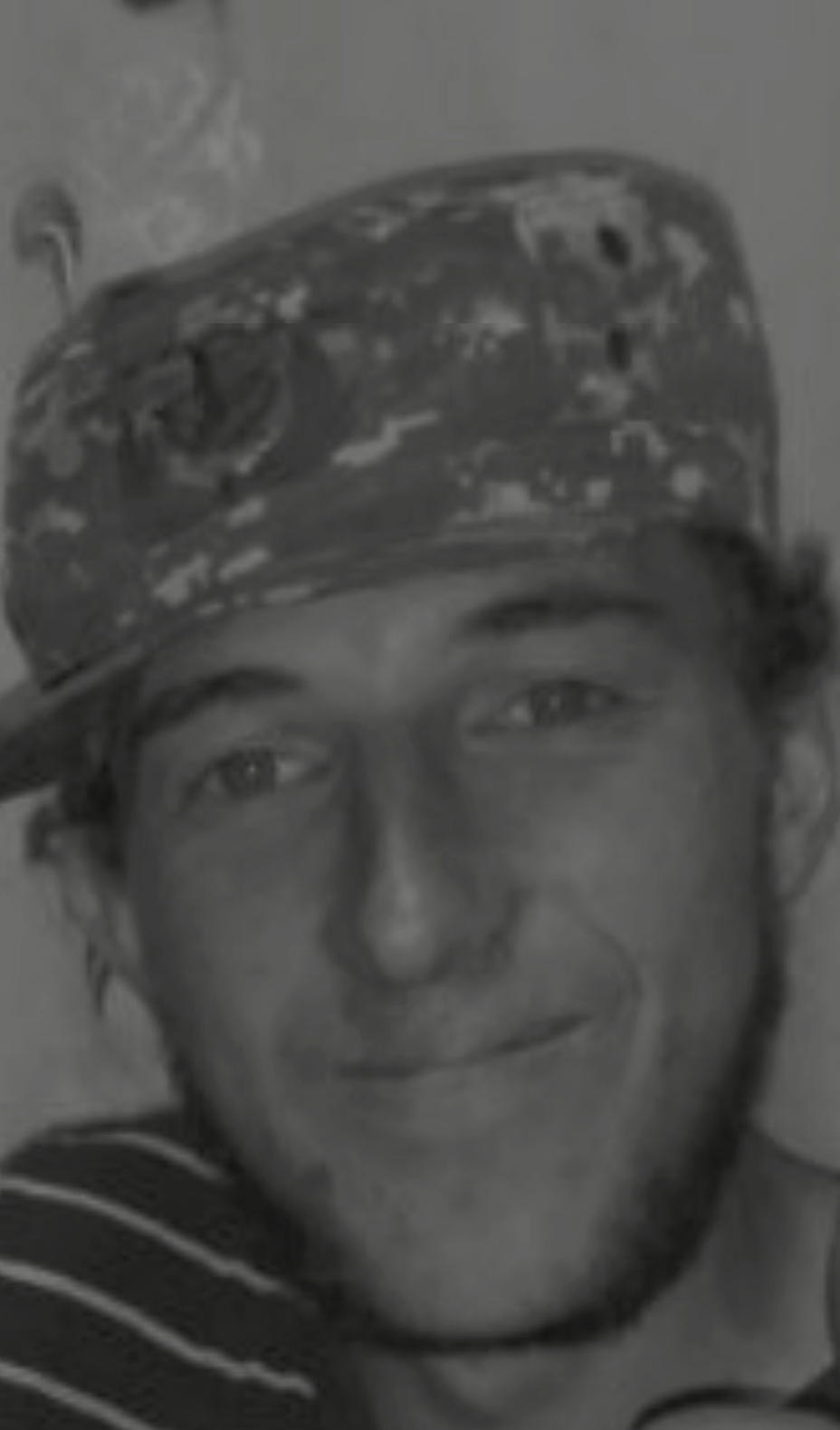 Ցերեկույթ՝ նվիրված Իոսիֆ Բրոդսկուն